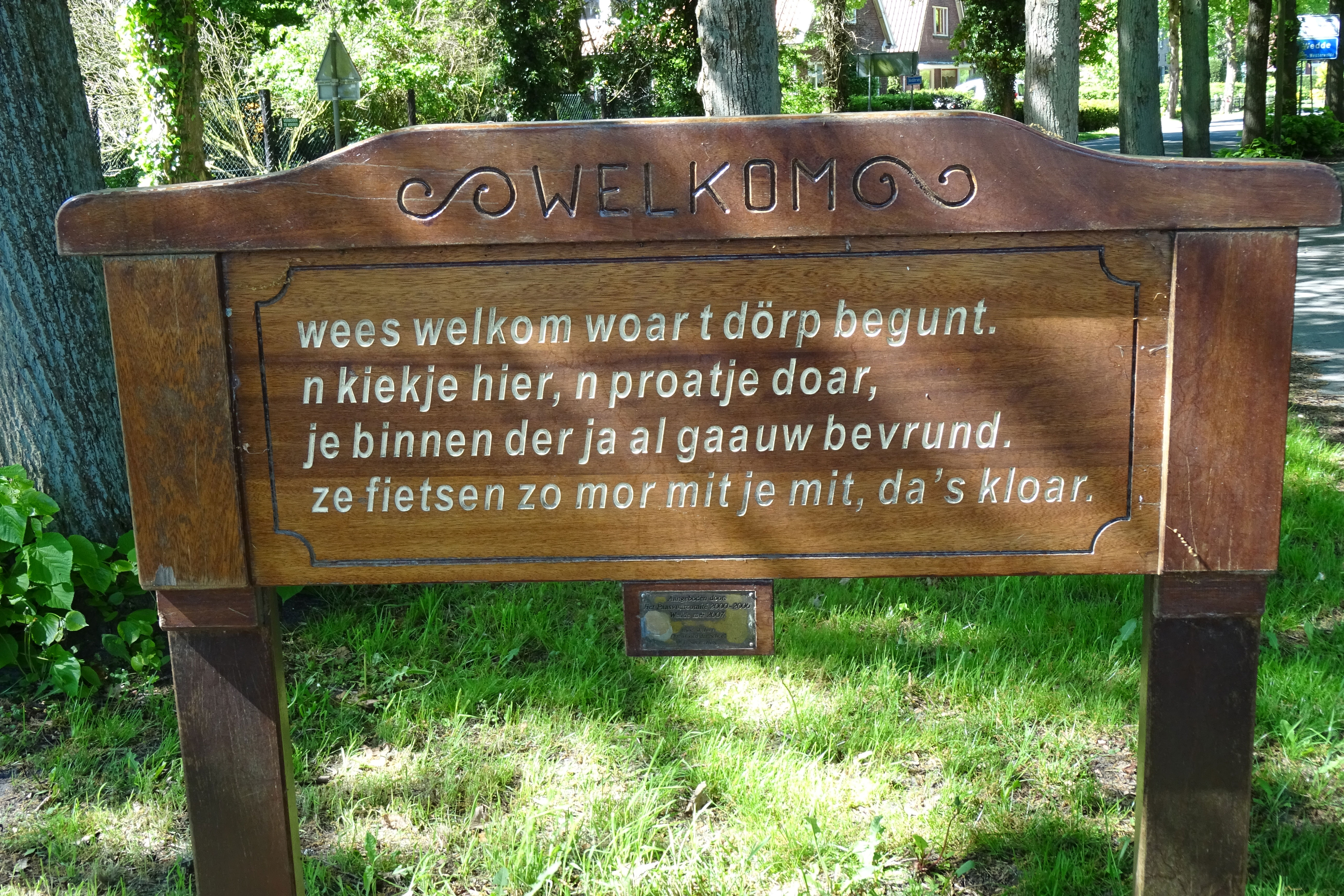 Welkom in Wedderheide